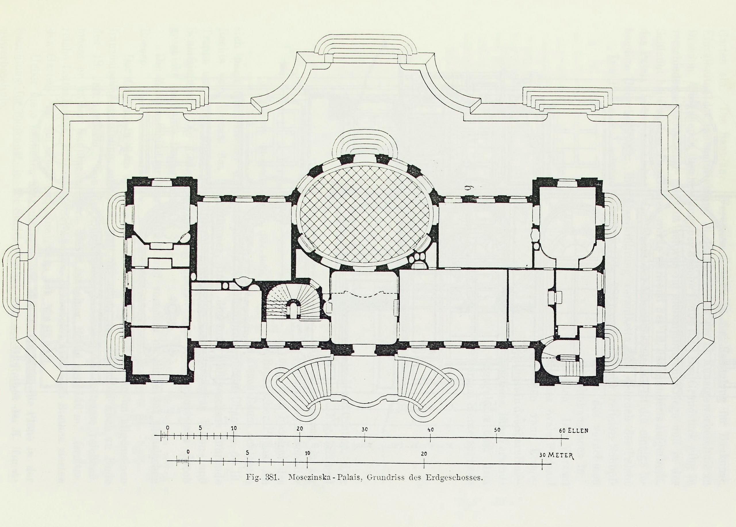 Grundriss des Moscinska-Palais in Dresden